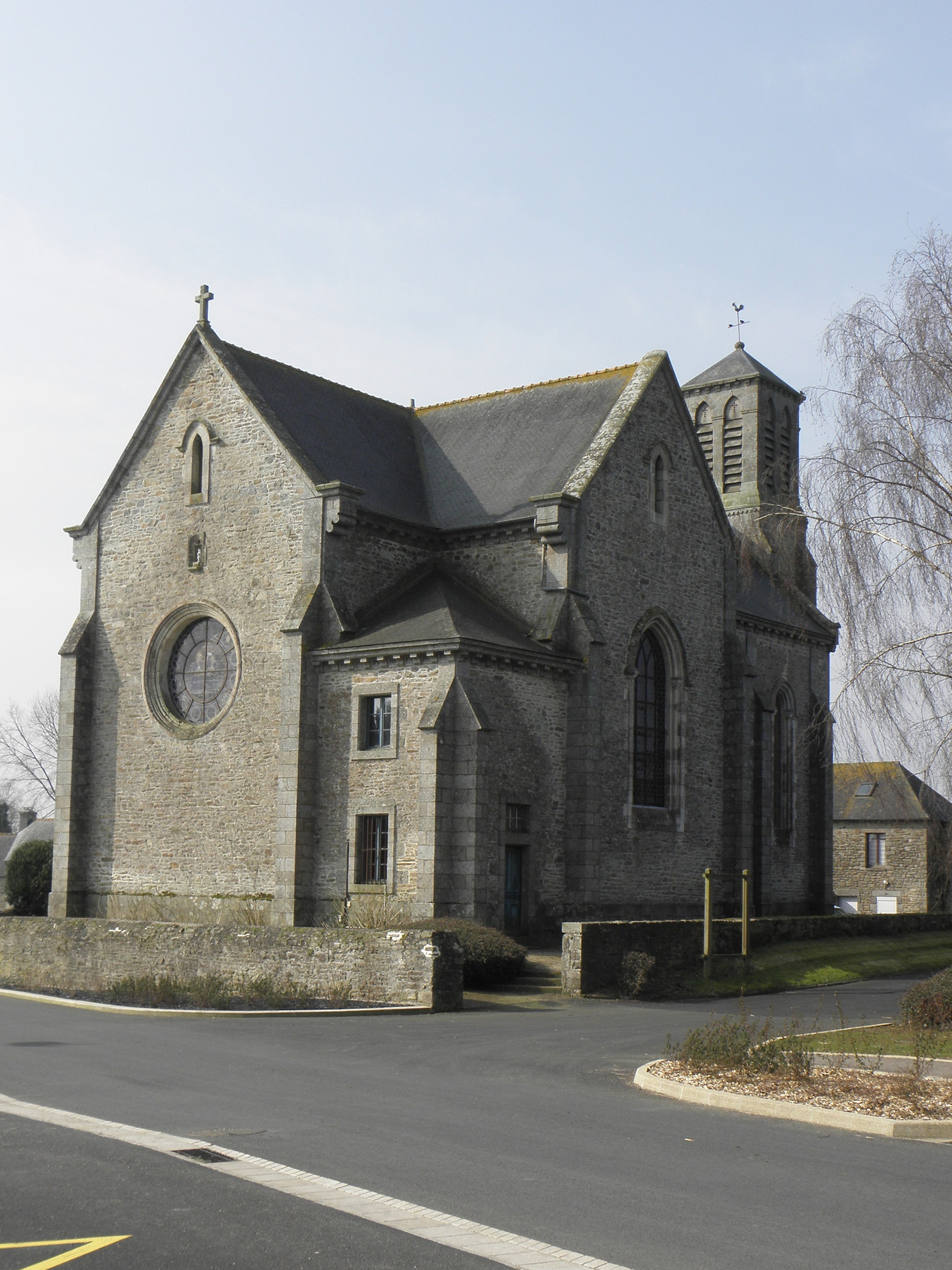 Église Notre-Dame à Senven-Léhart (22). Chevet et flanc sud.